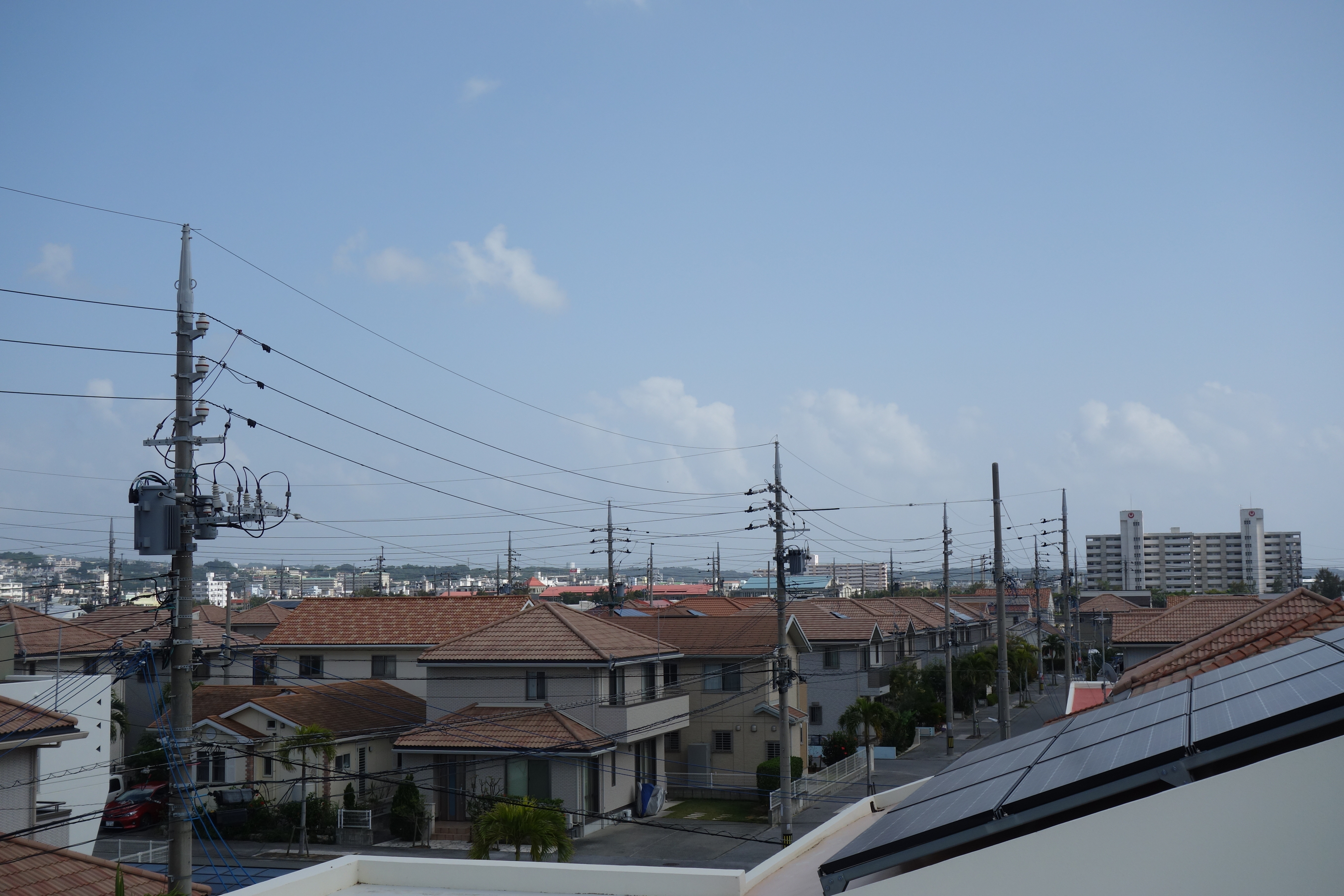 豊崎タウンの住宅街です。